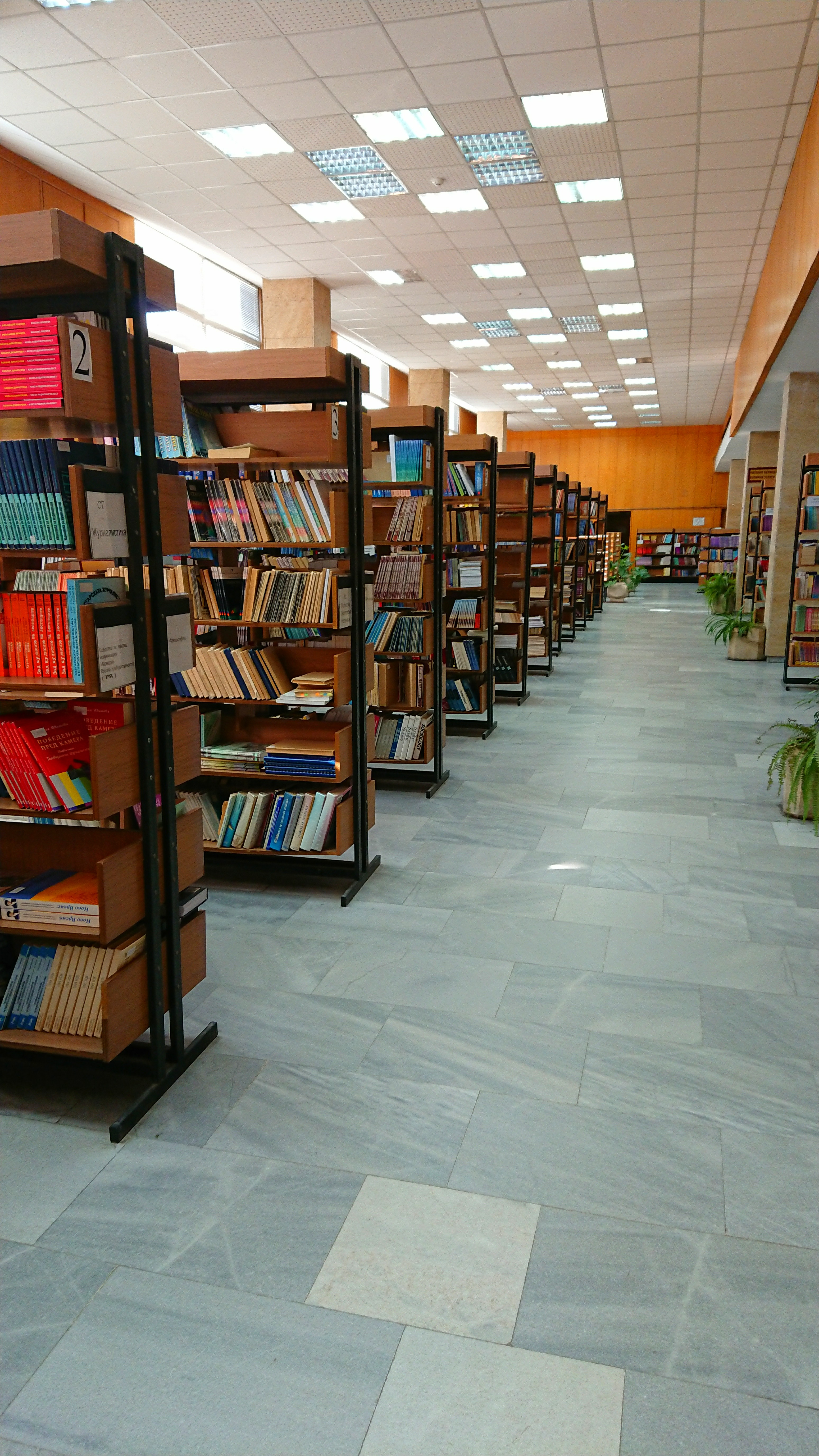 Библиотеката в УНСС